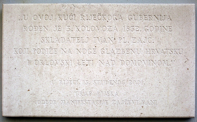 Spomen ploča na rodnoj kući Ivana pl. Zajca u ulici Matije Gupca 19 u Rijeci